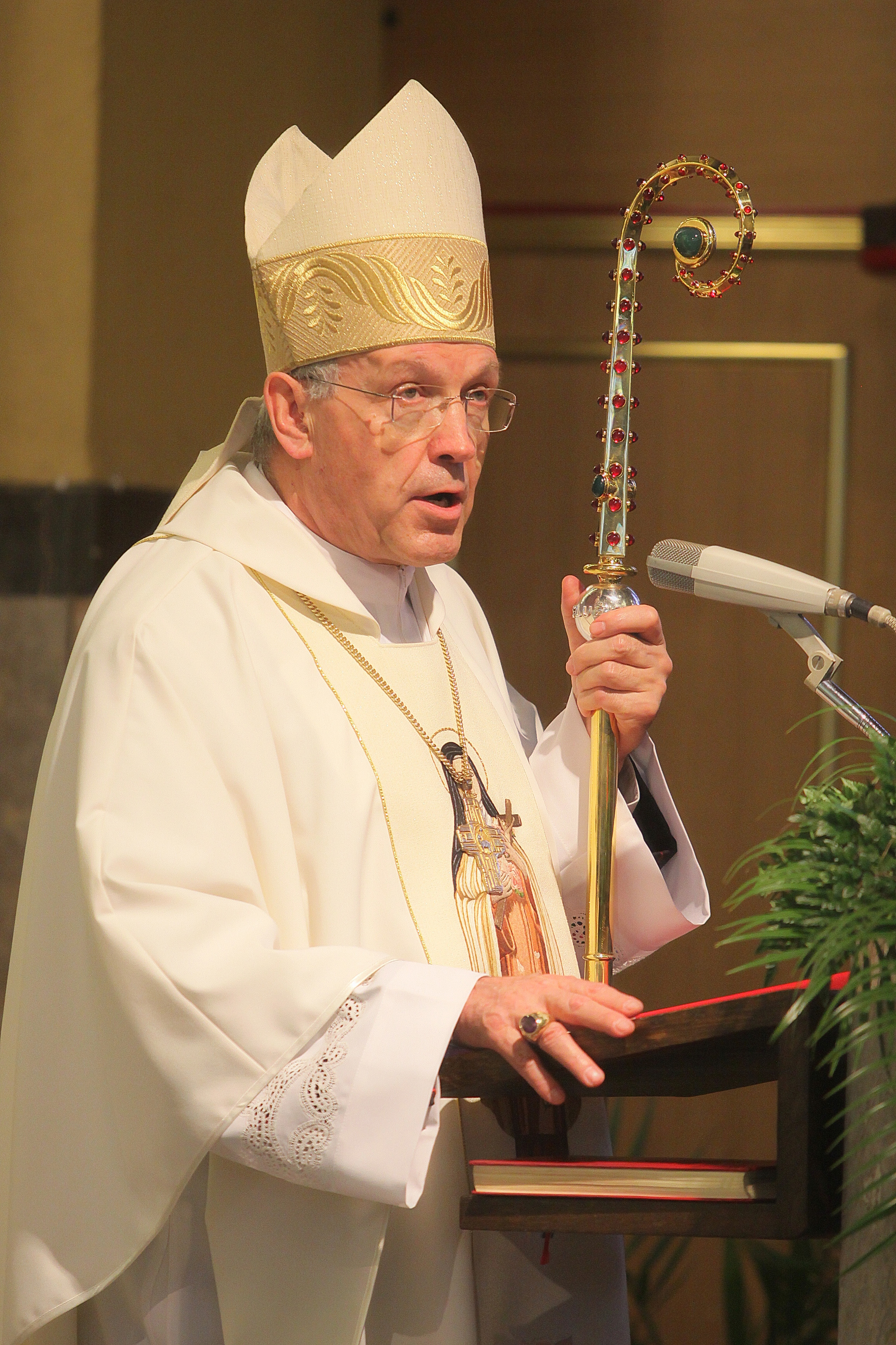 Anton Stres kot birmovalec na Kodeljevem